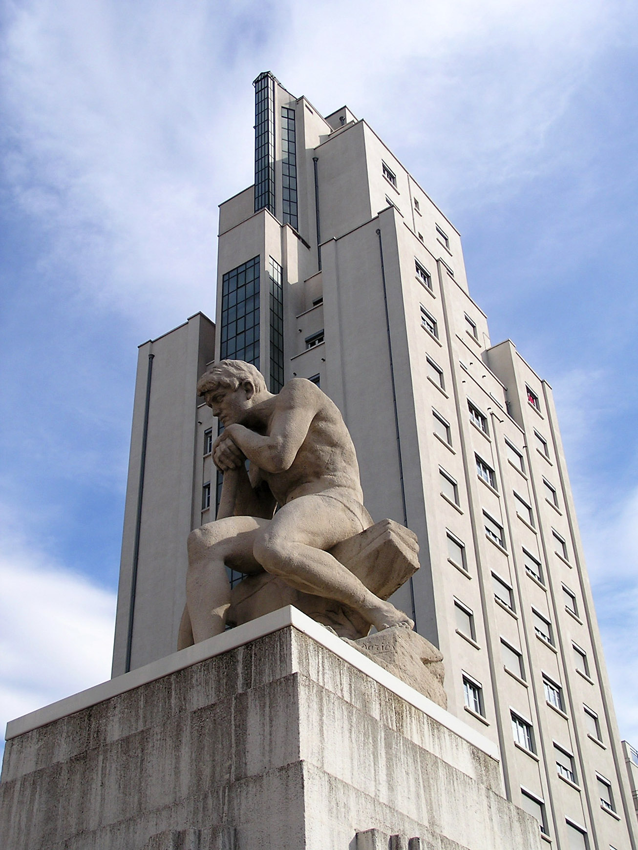 Le répit de l'agriculteur, à Villeurbanne, dans le quartier Gratte-Ciel, œuvre de Jules Pendariès.